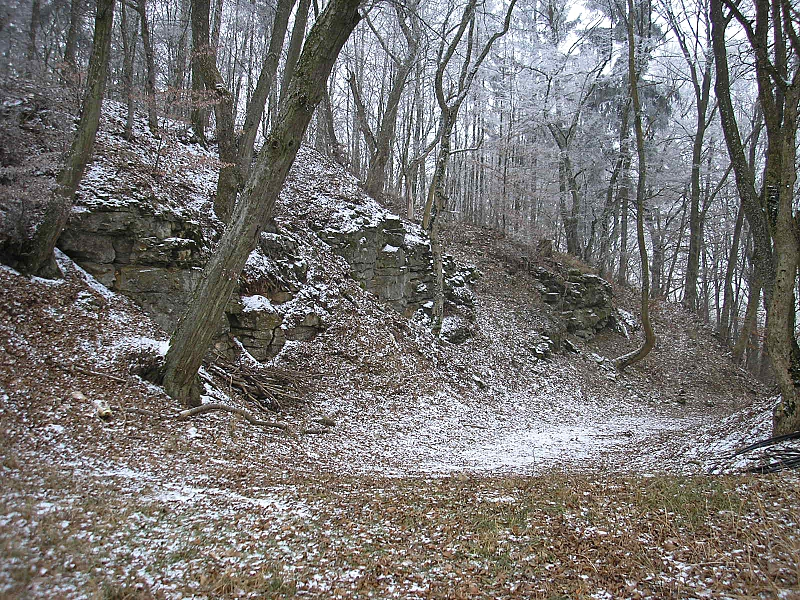 Burg Treuchtlingen (Obere Burg, Landkreis Weißenburg-Gunzenhausen, Mittelfranken). Der Halsgraben im Westen. Eigene Aufnahme, Dez. 2007 / Treuchtlingen castle (Upper castle, Middle Franconia, Bavaria, Germany). The western moat. Own photo, Dec. 2007